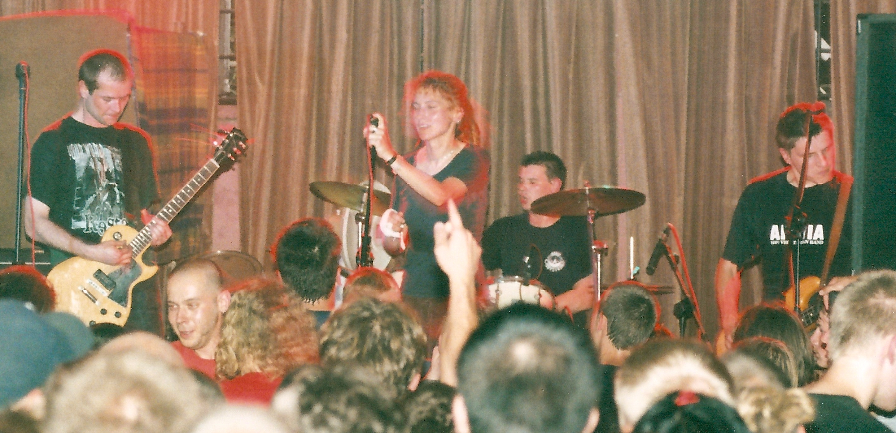 Post Regiment